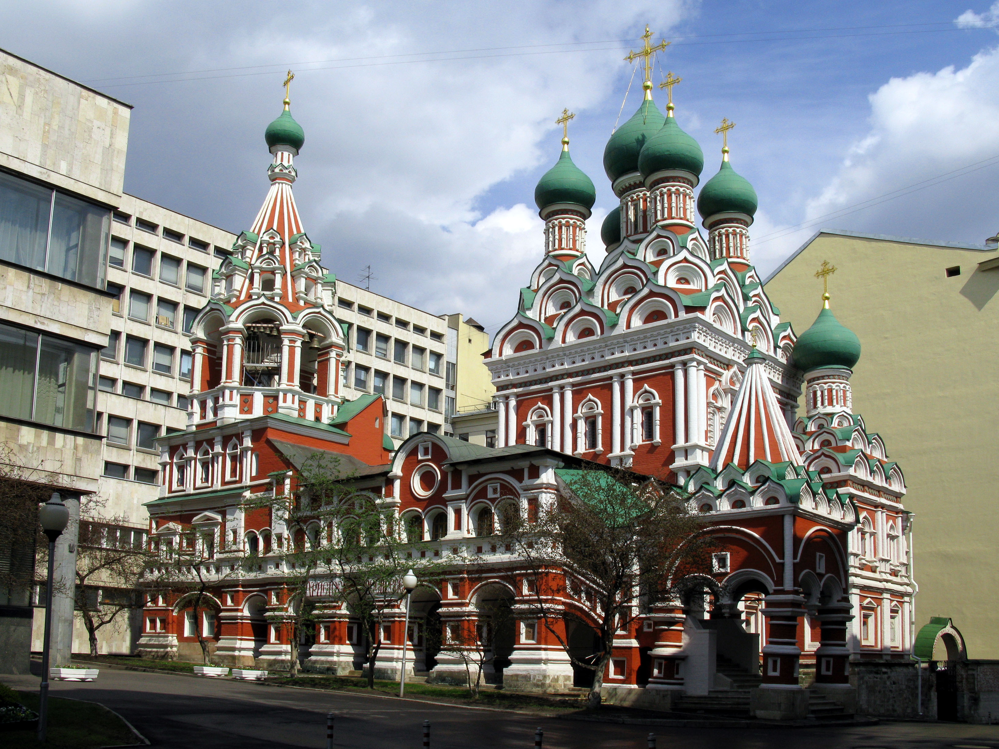 Храм Троицы Живоначальной в Никитниках (Грузинской иконы Божией Матери на Варварке)